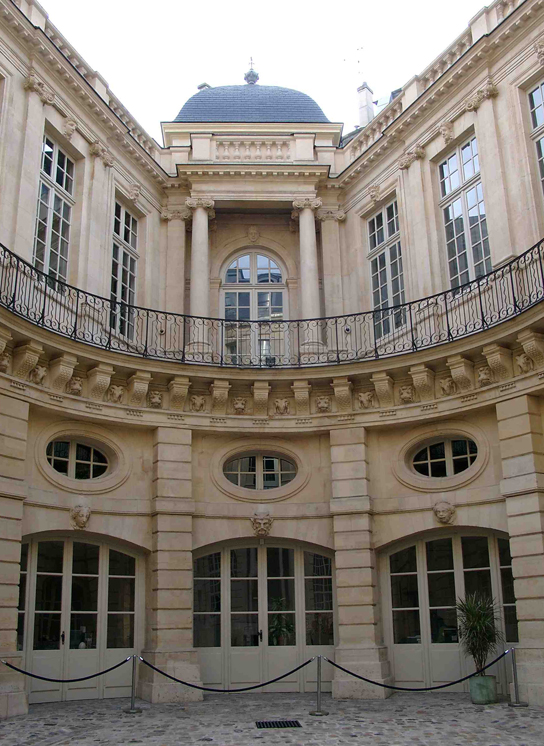 Hôtel de Beauvais, Courtyard, Paris, 4. Arr.